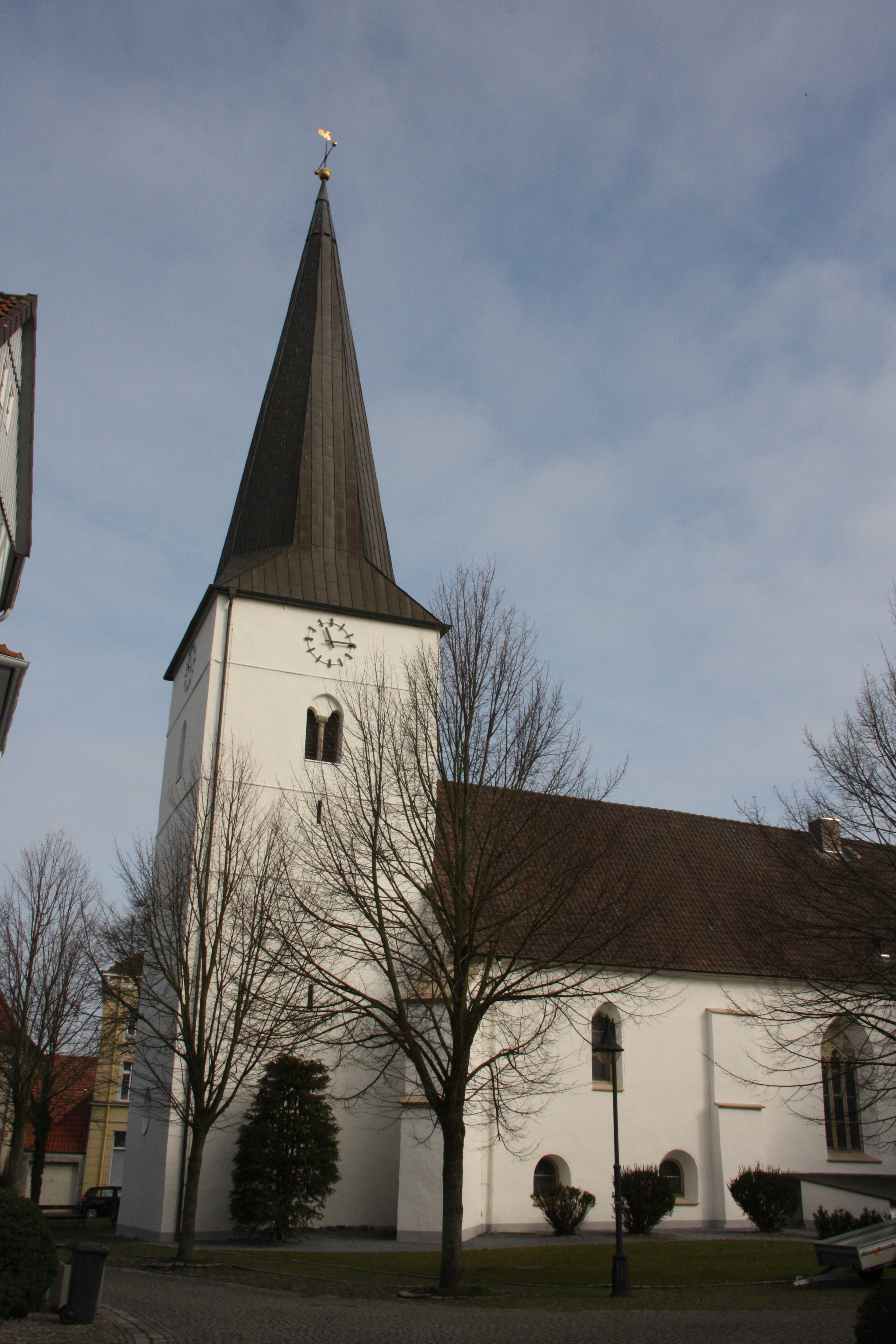 St. Marien Kirche Dielingen von der Suedseite